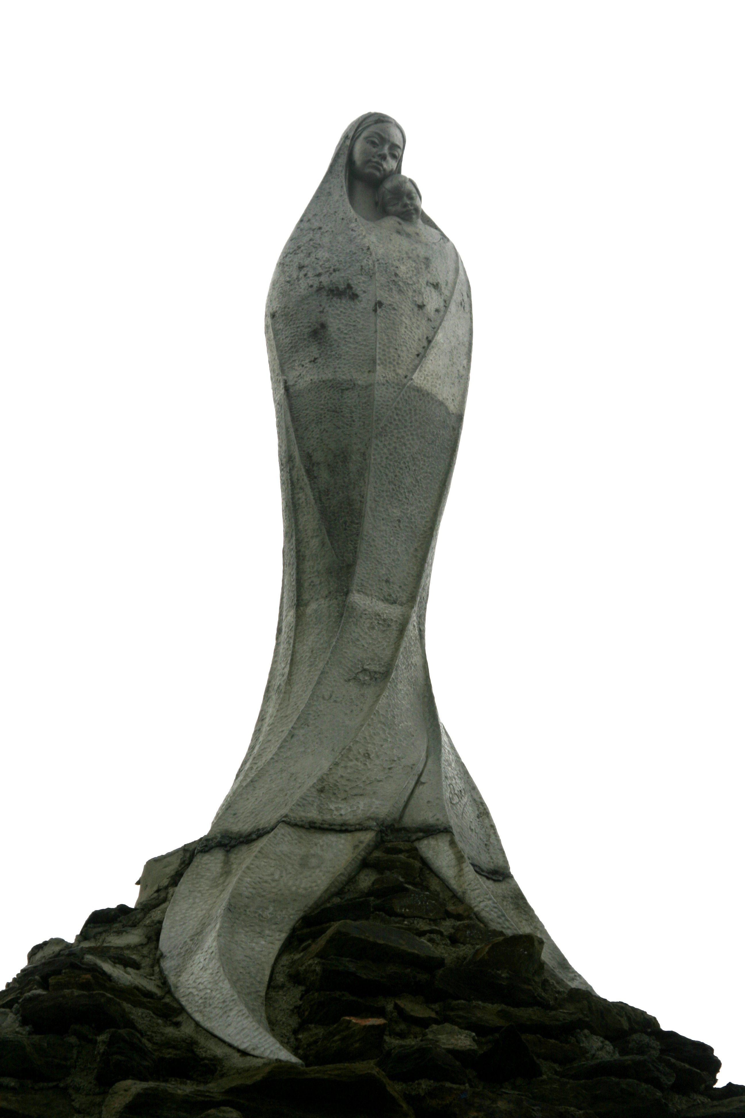 Escultura de la Virgen de las Nieves realizada vaciada en aluminio por Francisco López Burgos y emplazada en la parte superior de la urbanización de la Estación de Esquí de Sierra Nevada (España).